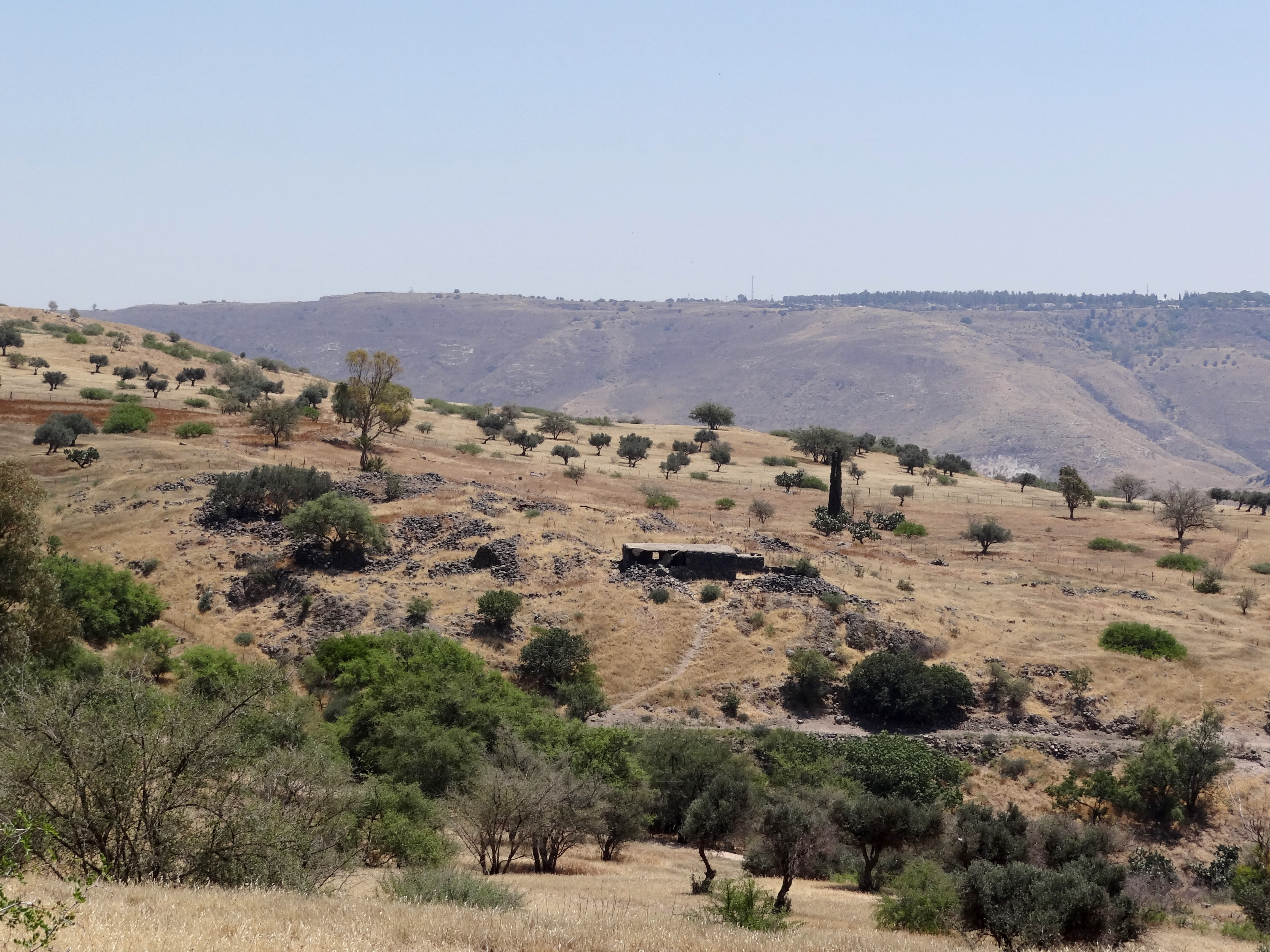 שרידי המושבה בני יהודה בדרום רמת הגולן שהתקיימה בשנים 1886-1920. השרידים נמצאים בתחום שמורת טבע סוסיתא. במקום נעשה שיקום של מבנה אחד אבל גם נחשב מבנה מסוכן